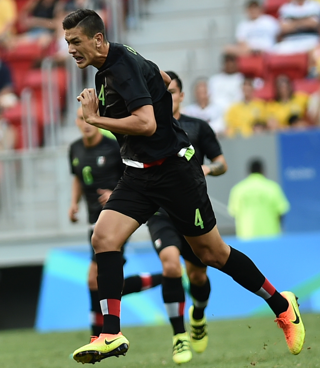 Estádio Nacional de Brasília Mané Garrincha, Brasília, DF, Brasil, 10/8/2016 Foto: Andre Borges/Agência Brasília Coréia do Sul e México jogam nesta quarta-feira (10), no Estádio Mané Garrincha, pelo grupo C do futebol masculino nas Olimpíadas 2016.